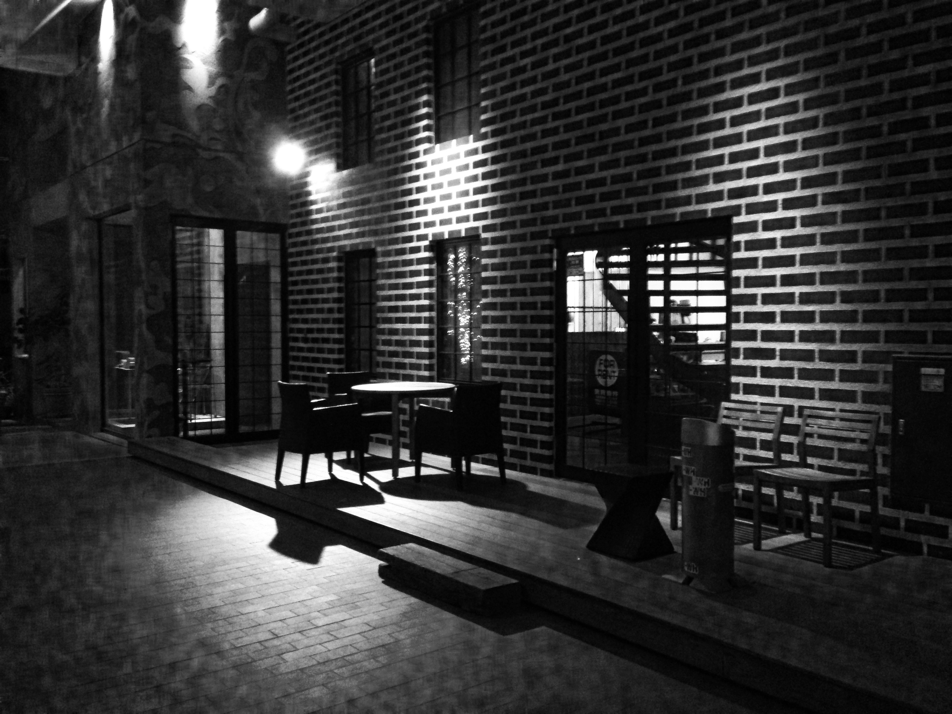 骨材と本物のレンガの調和